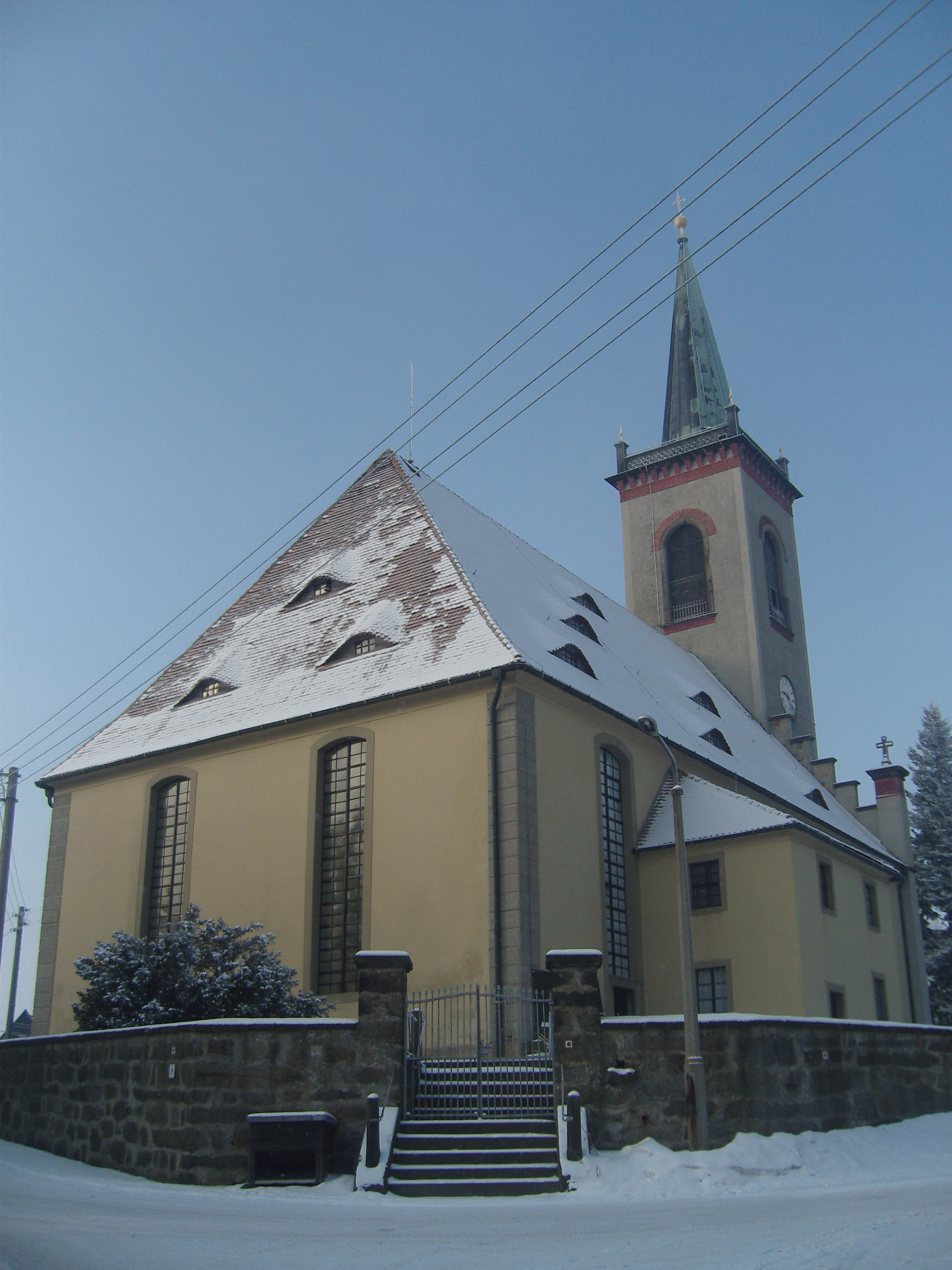 Barockkirche in Kottmarsdorf (erstmals 1346 in einer Urkunde erwähnt und in ihrer heutigen Form 1736 erbaut, 1854 um einen 50 m hohen Kirchturm erweitert)